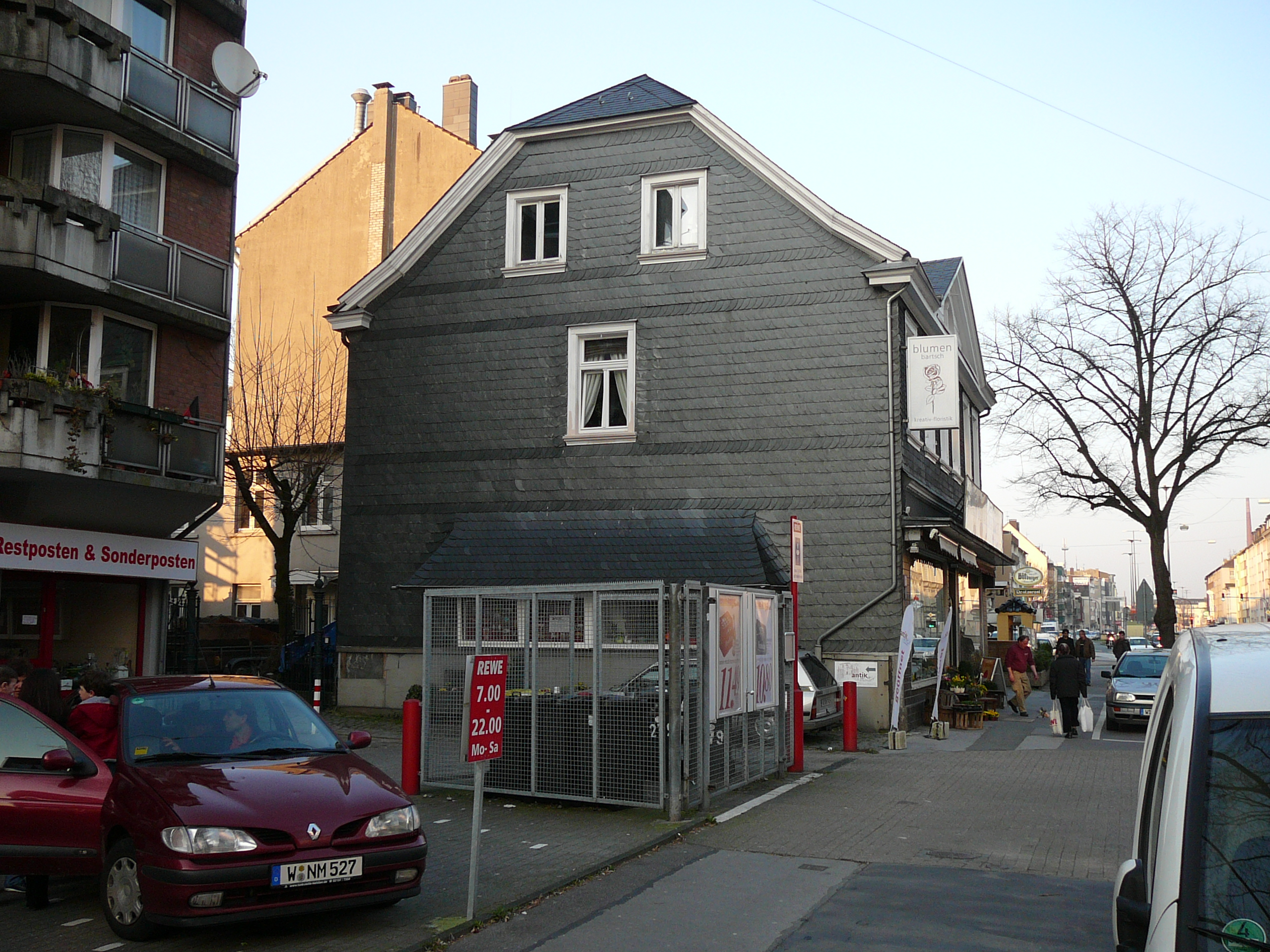 Friedrich-Engels-Allee, Wuppertal